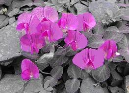 Վավիլովիա